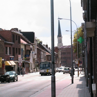 Schelle en Antverpenio